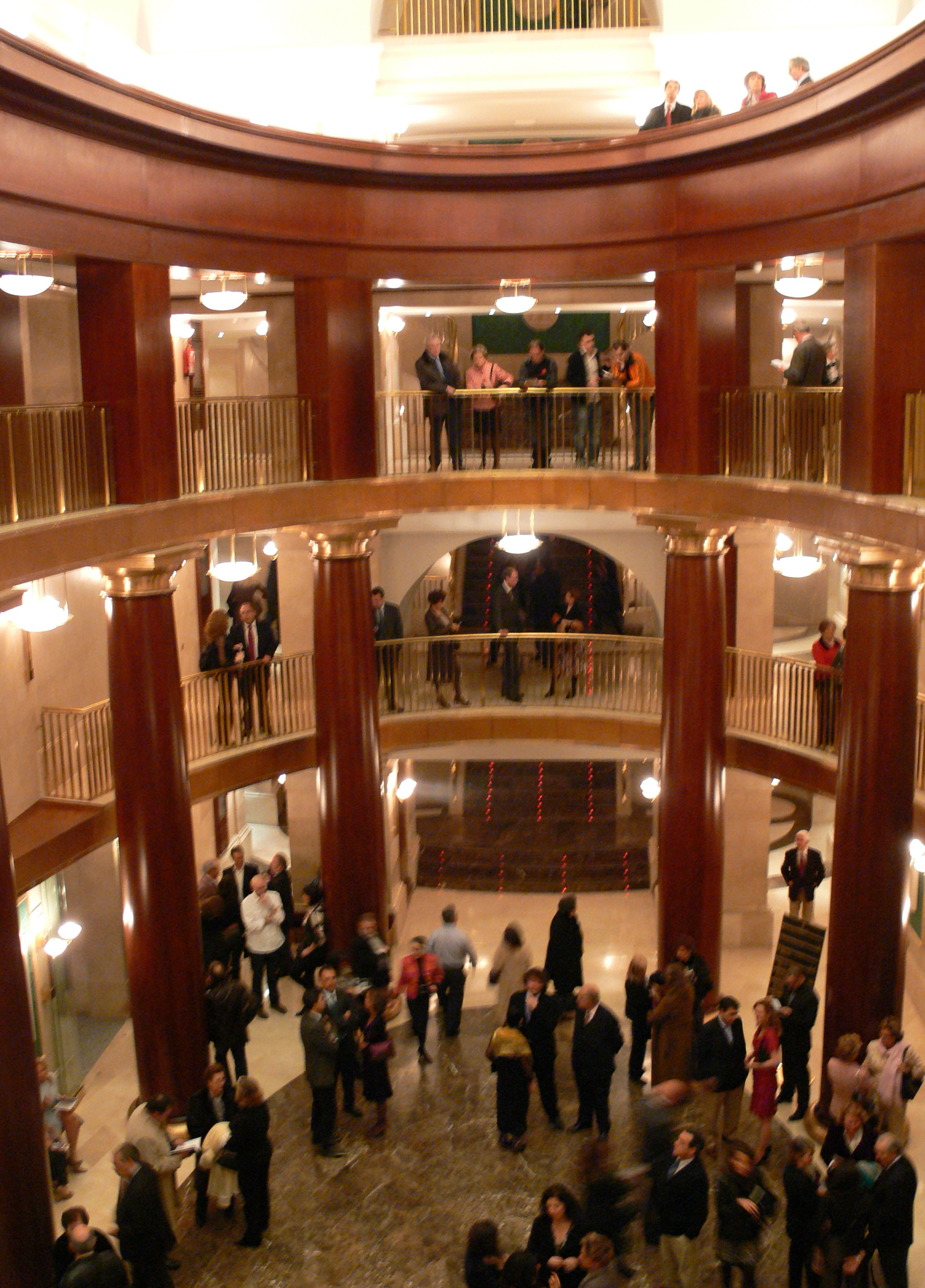 Teatro Real, Madrid: Foyer